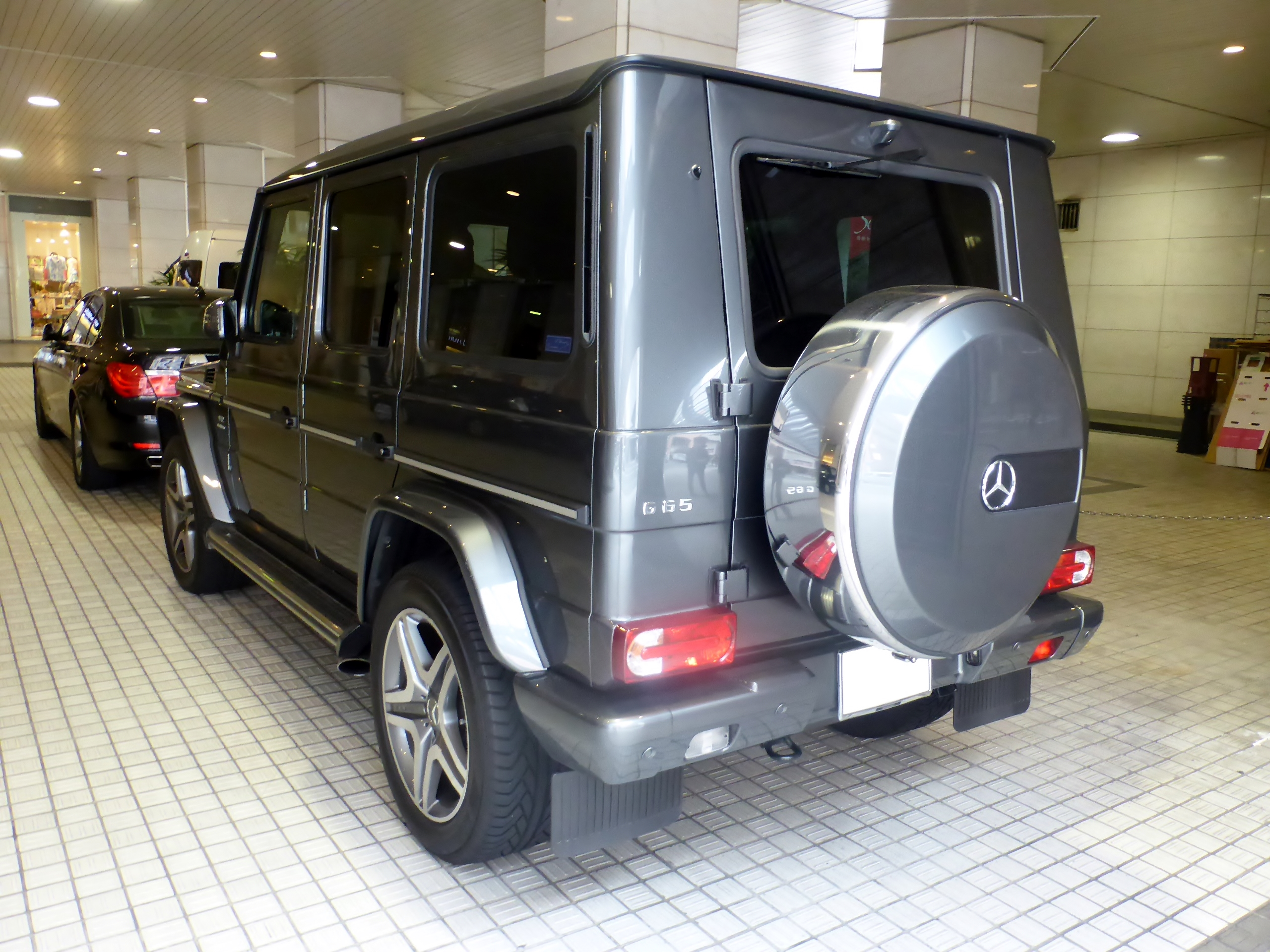 W463型メルセデス・ベンツG65 AMGをリアから撮影。